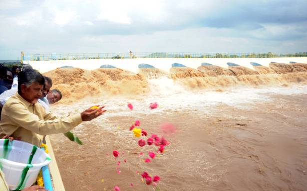 అంధ్రప్రదేశ్ ముఖ్యమంత్రి